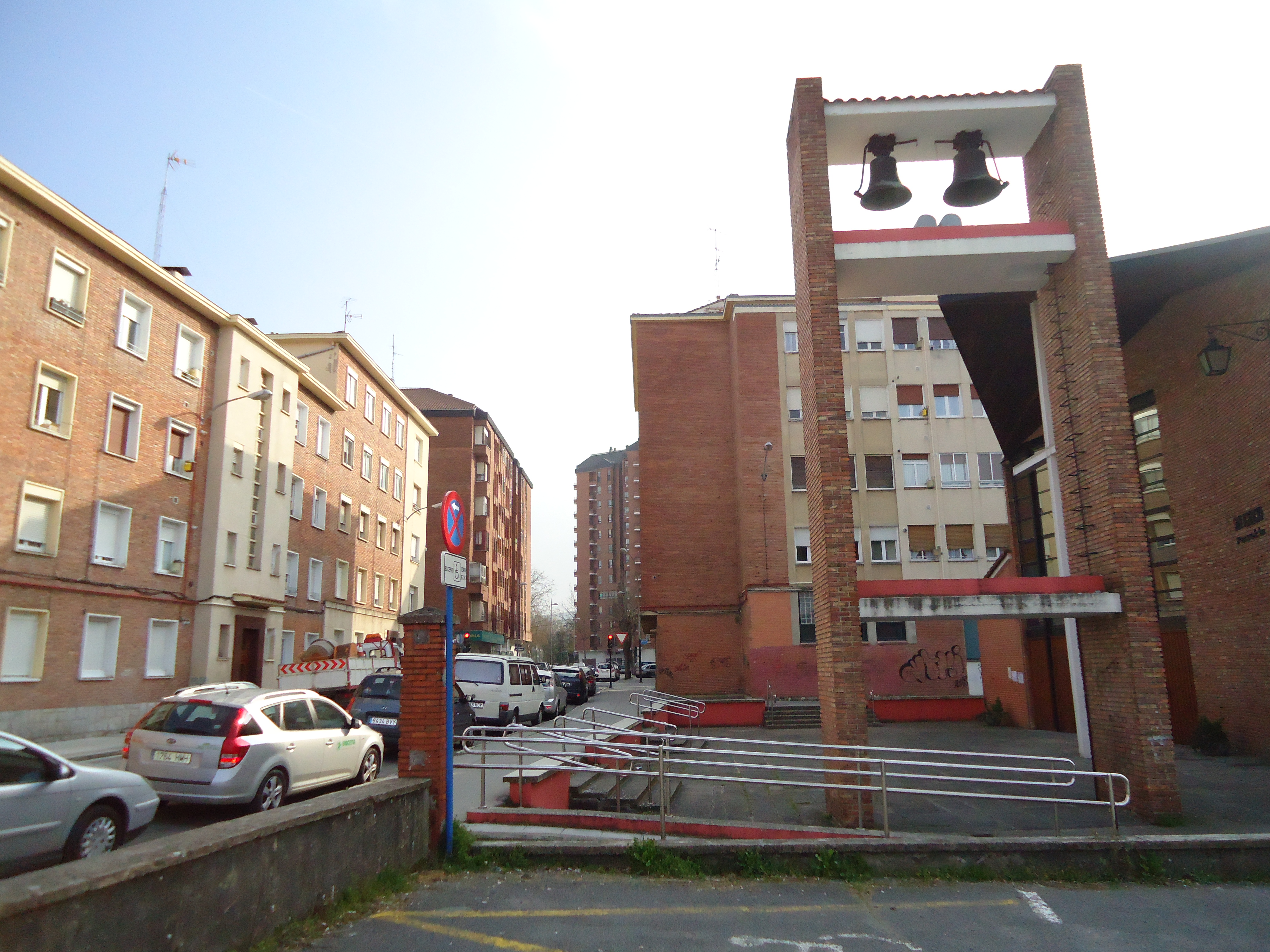 Adurtzako San Ignazio elizaren kanpandorrea